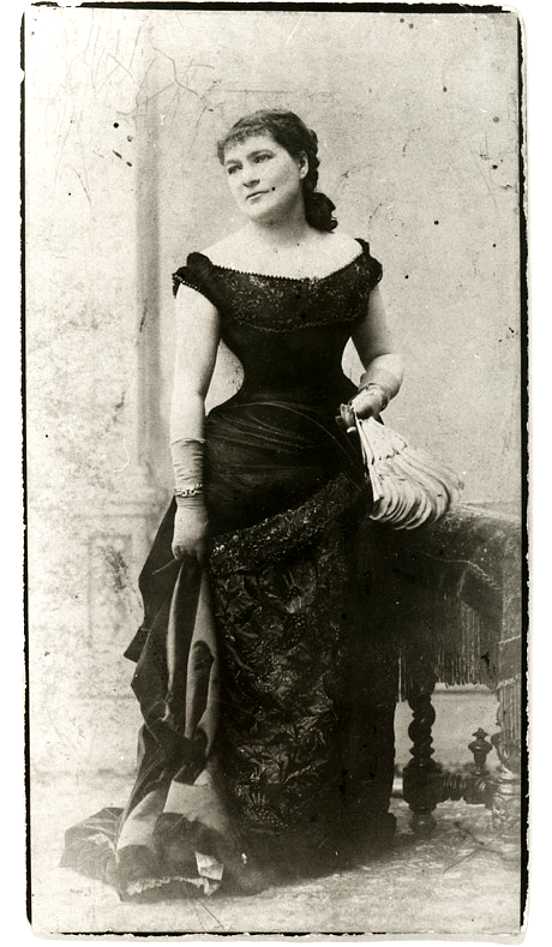 Munkácsy Mihályné Cecile Papier nagyestélyiben, legyezővel